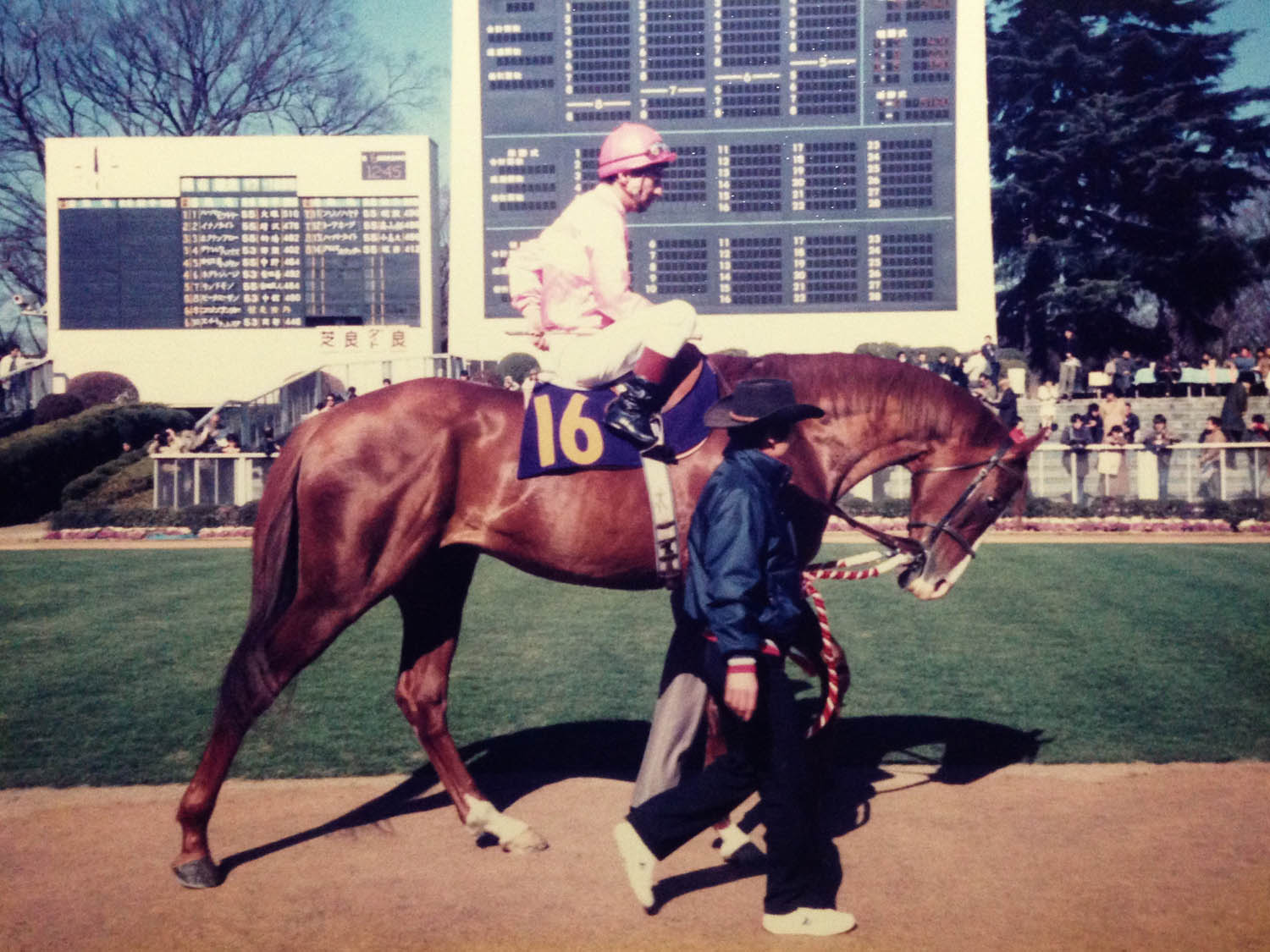 1987年2月1日、東京競馬場にて引退式